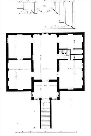 Villa Forni Cerato a Montecchio Precalcino (Vicenza). Disegno da Ottavio Bertotti Scamozzi, 1778